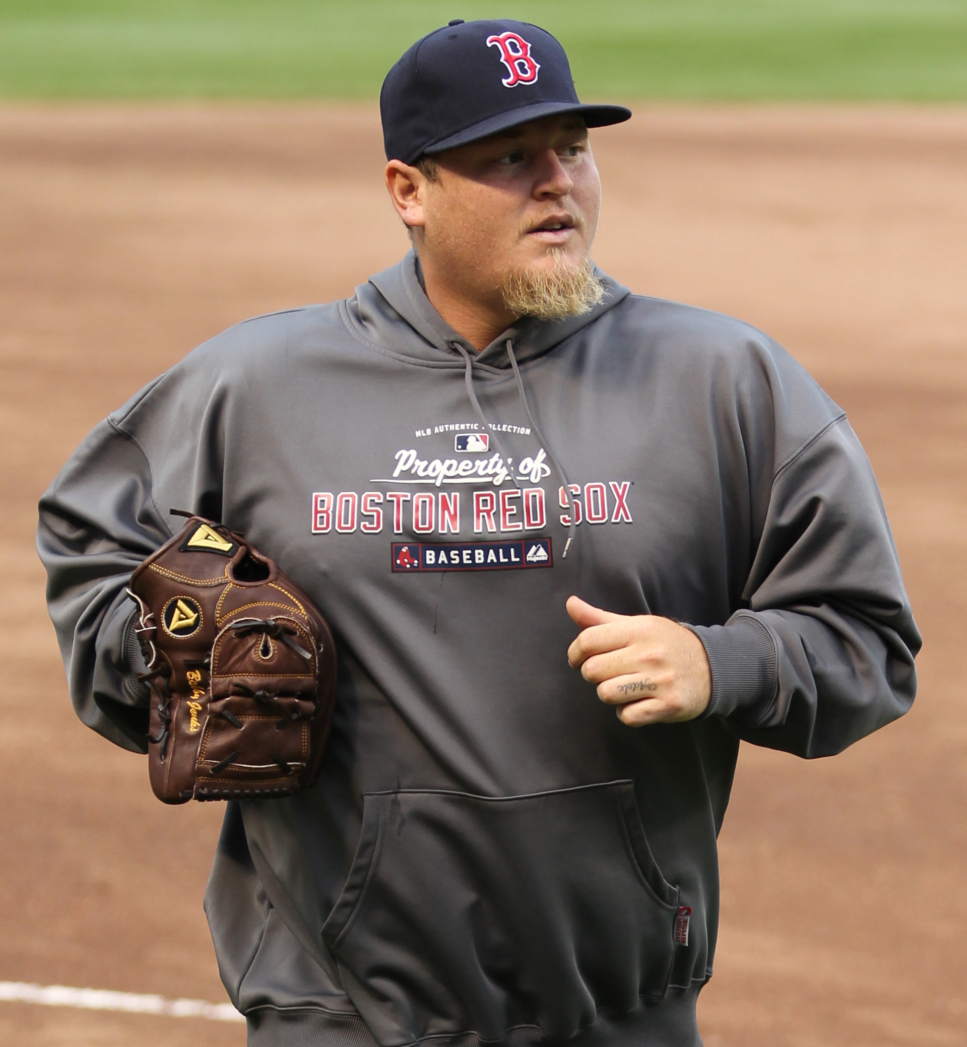 Bobby Jenks